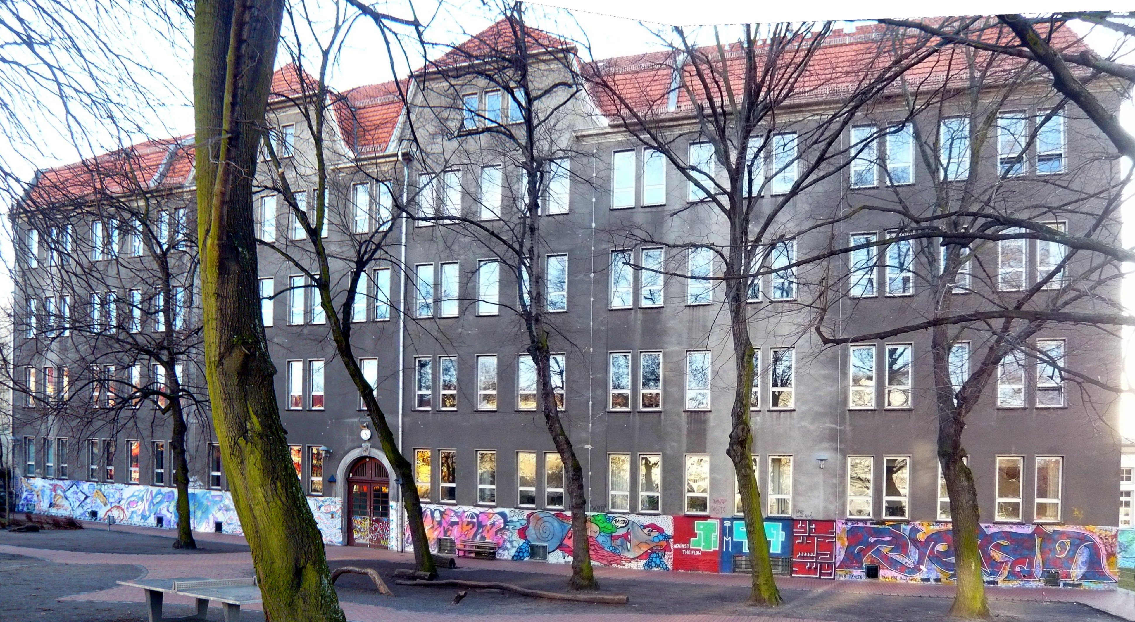 Berlin-Friedrichshain, Marchlewskistraße, im mittleren Bereich: Hofseite der Dathe-Oberschule (Haupteingang Helsingsforser Straße)